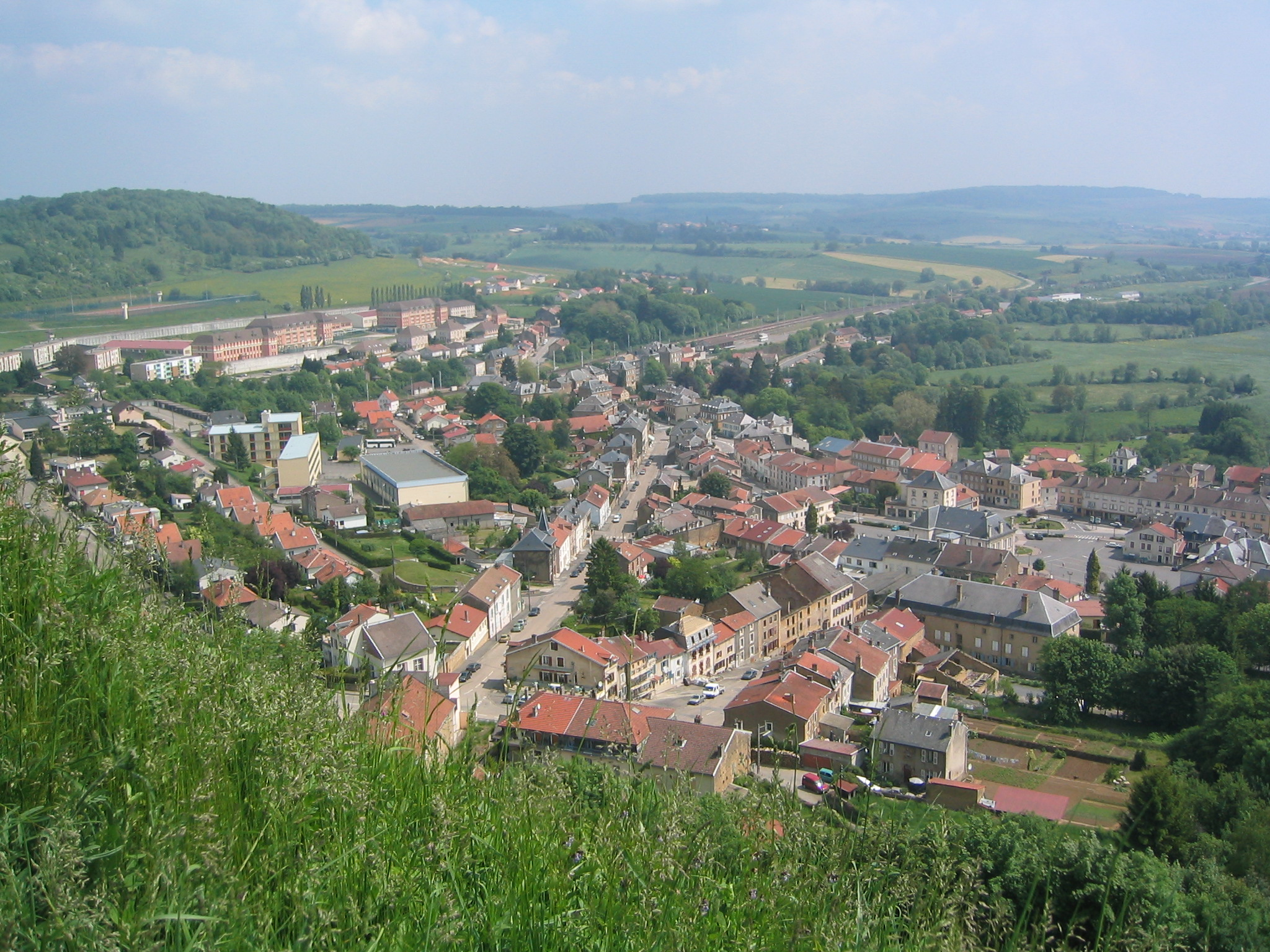 Vue générale de Montmédy (Meuse, France)